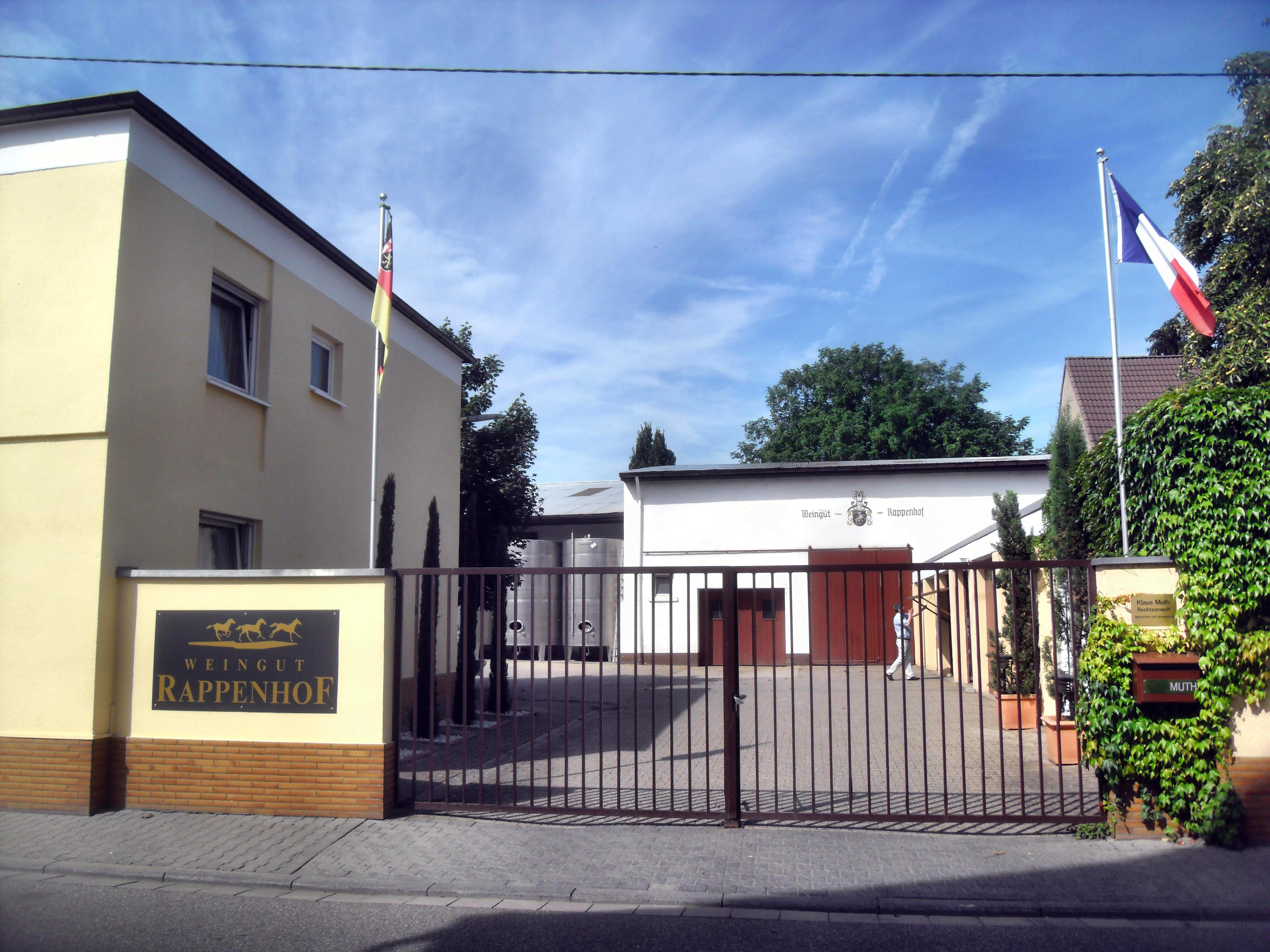 Weingut Rappenhof in Alsheim (Deutschland), Haupteinfahrt von der Bachstraße aus